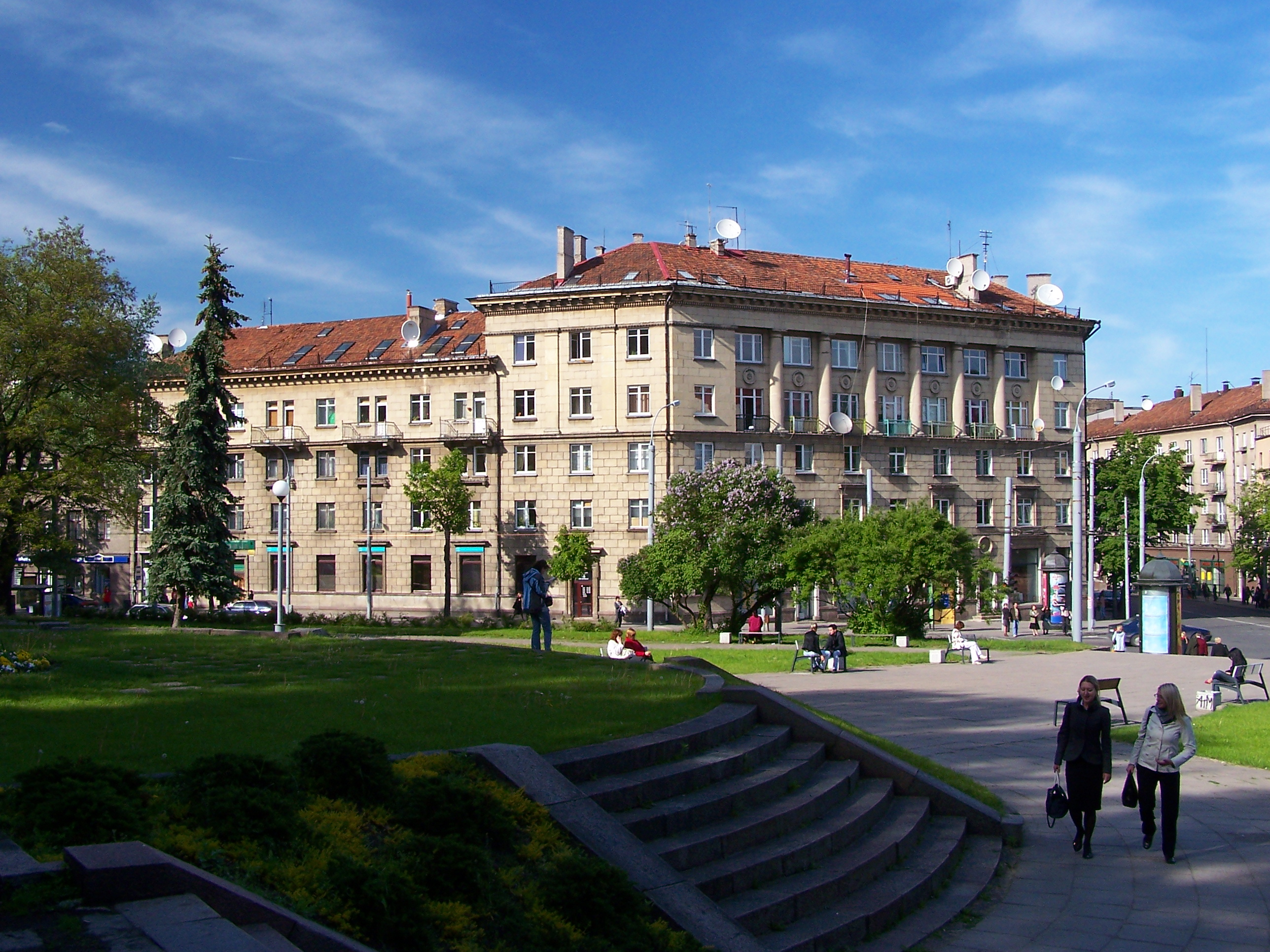 Gebäude des ehemaligen Jüdischen Gymnasiums in Vilnius